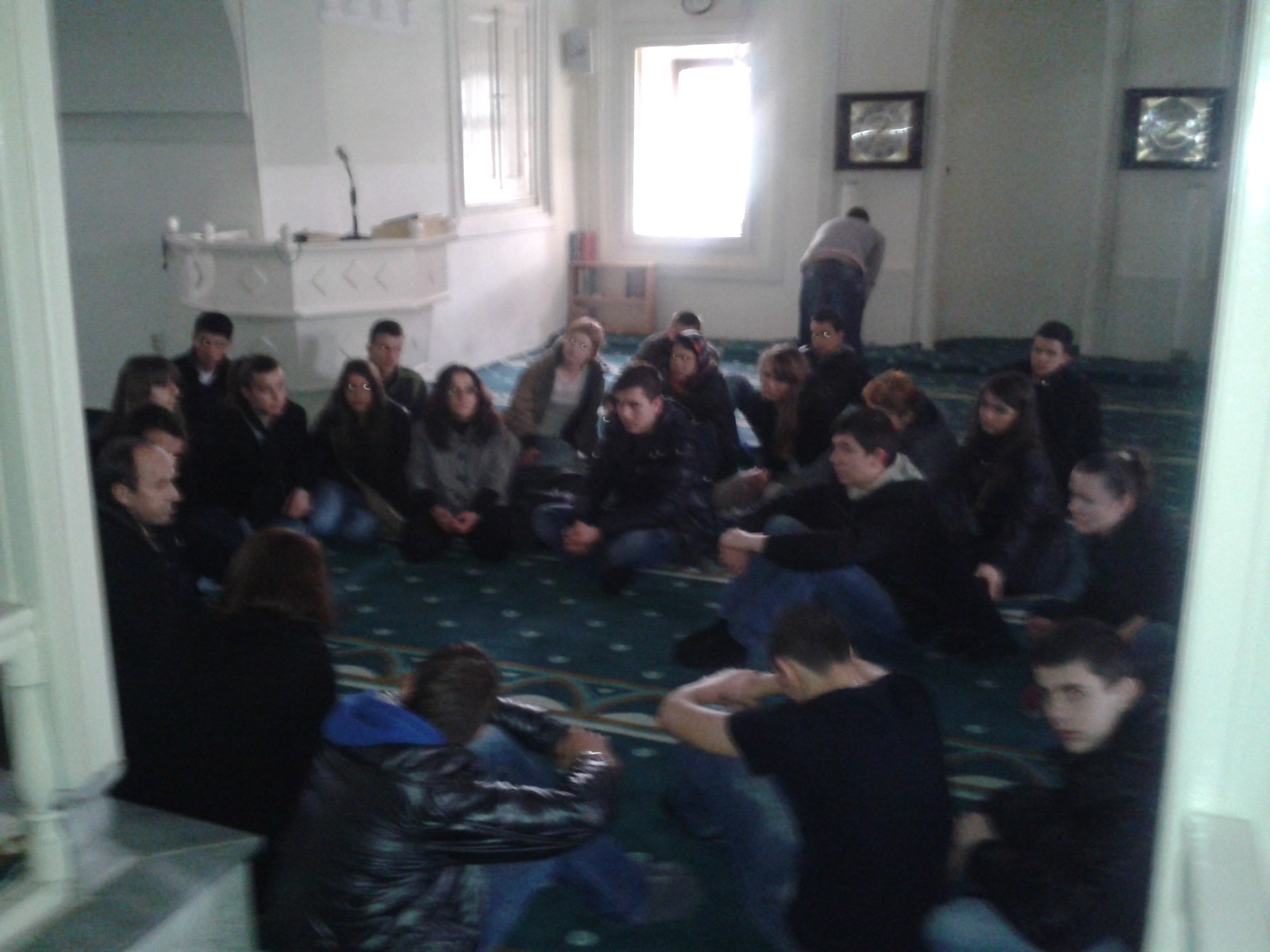 Еднакви во различностите - посета на џамија